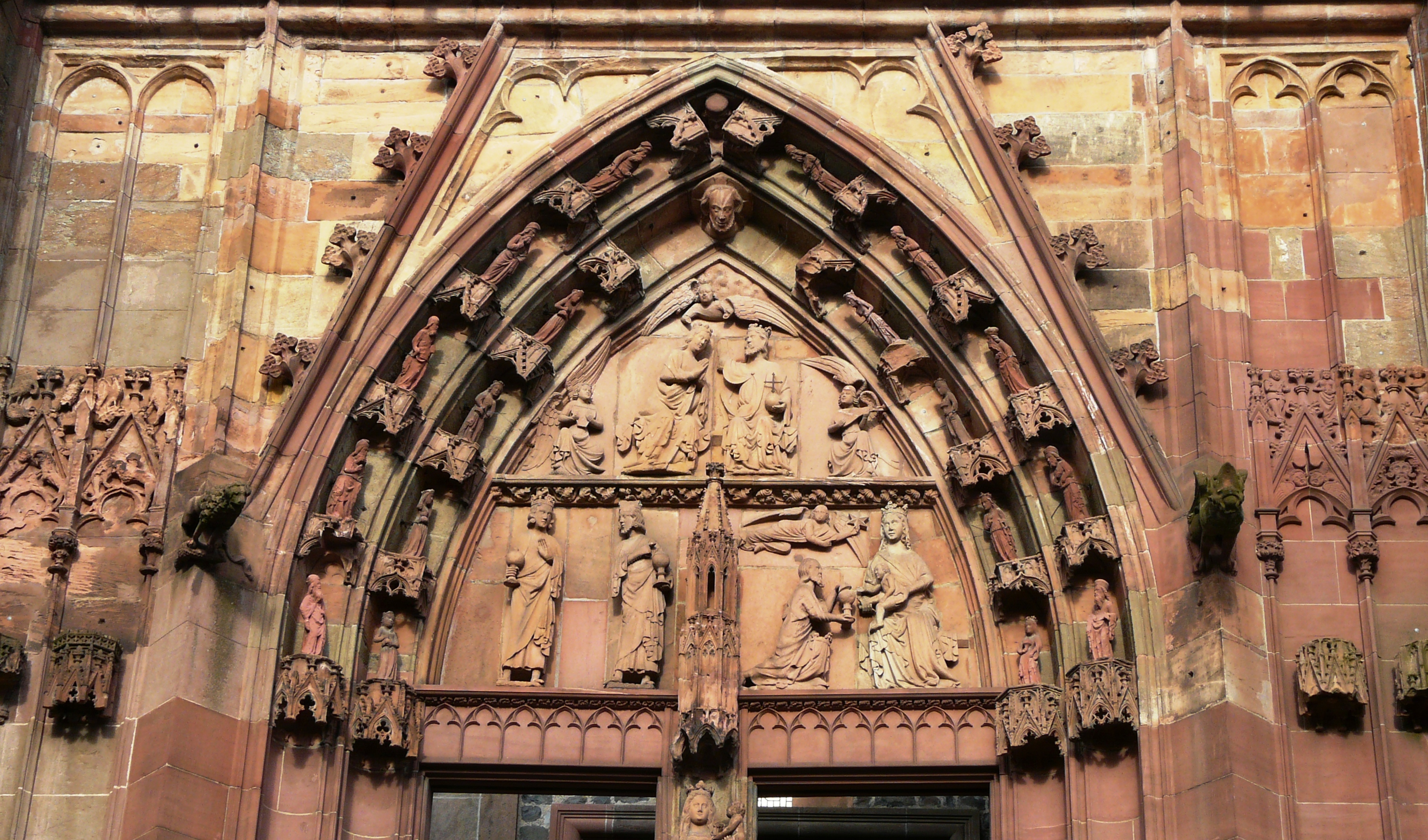 Das Tympanon am Westportal des Wetzlarer Doms, Wetzlar (Hessen)